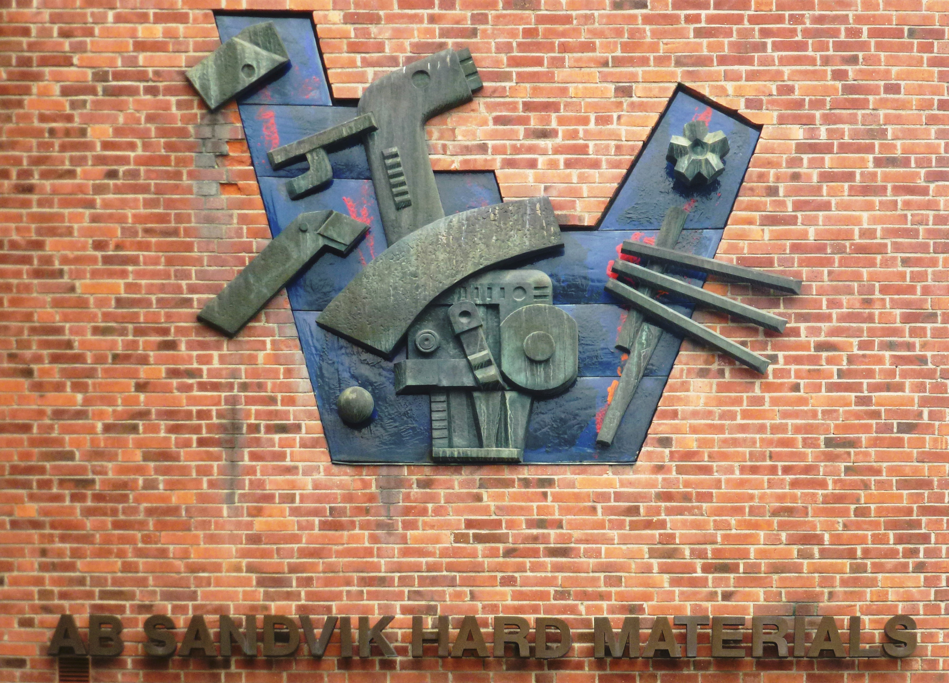 Sandvik Västberga industriområde, Lerkrogsvägen 19, fasadskulptur